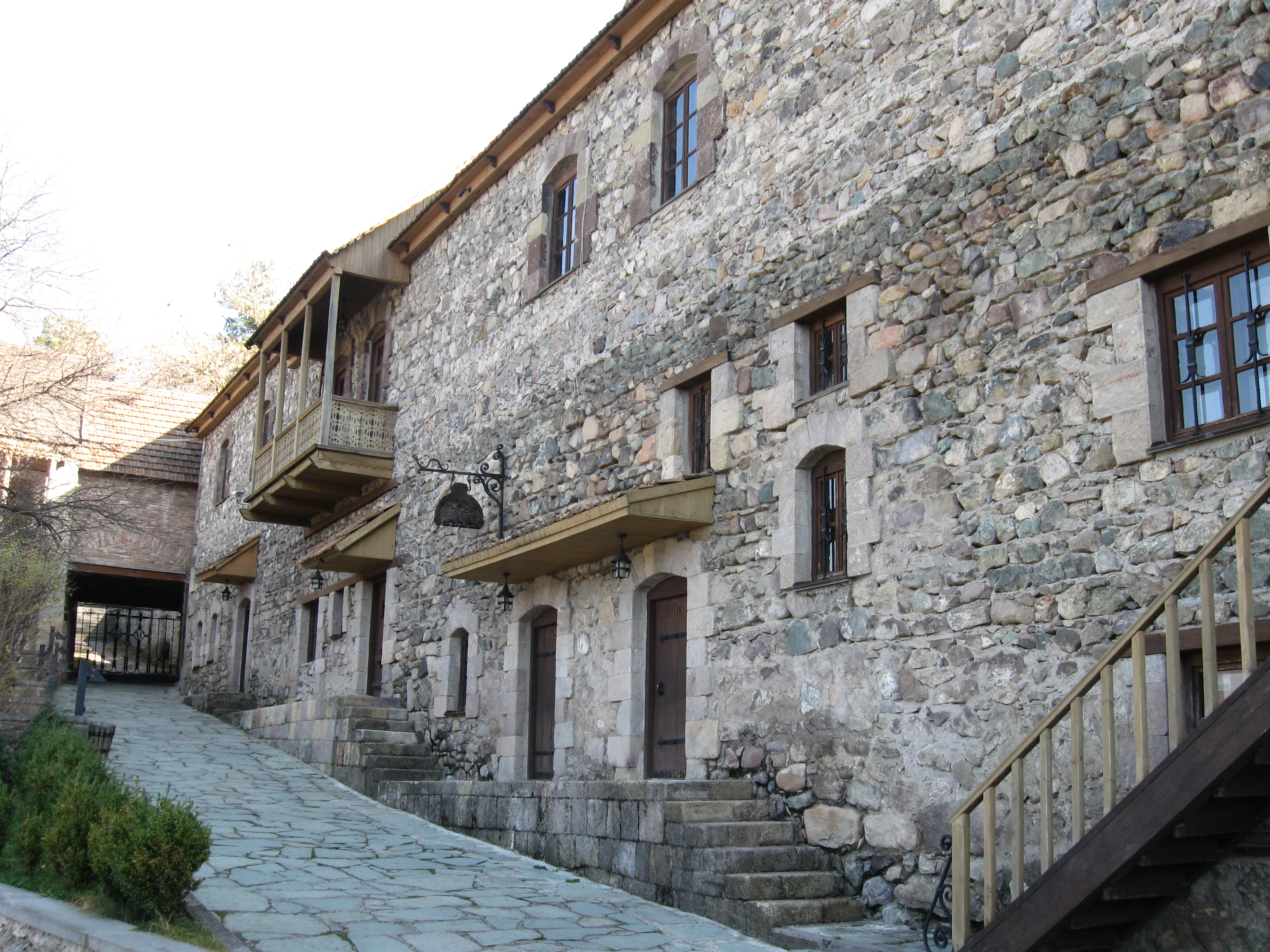 Հին Դիլիջան